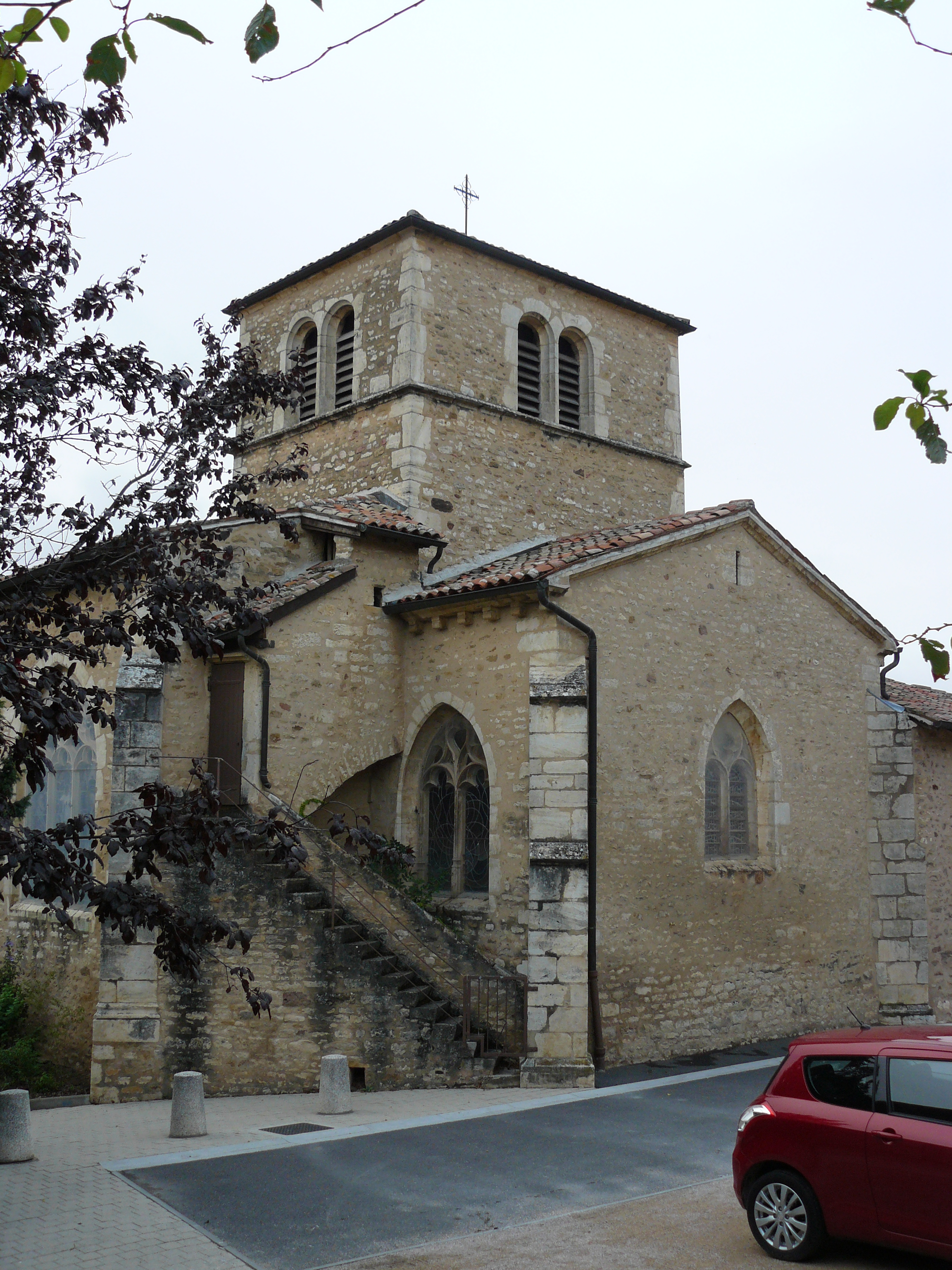 Église Saint-Barthélemy de Pommiers, (Inscrit, 1926) .